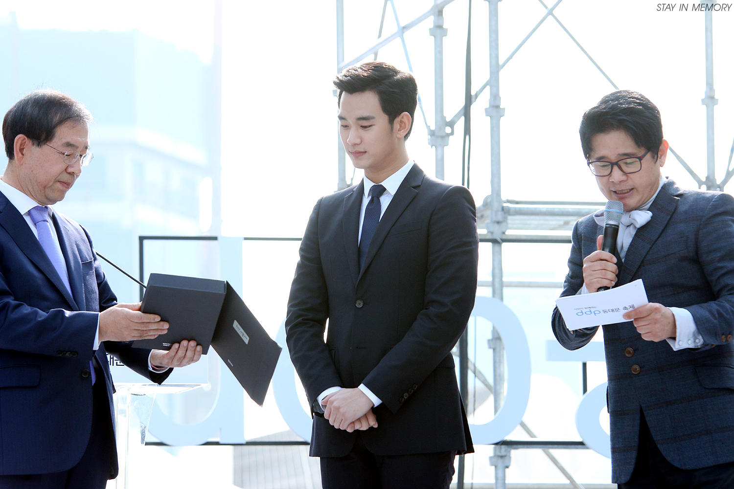 141025 서울시 홍보대사 위촉식